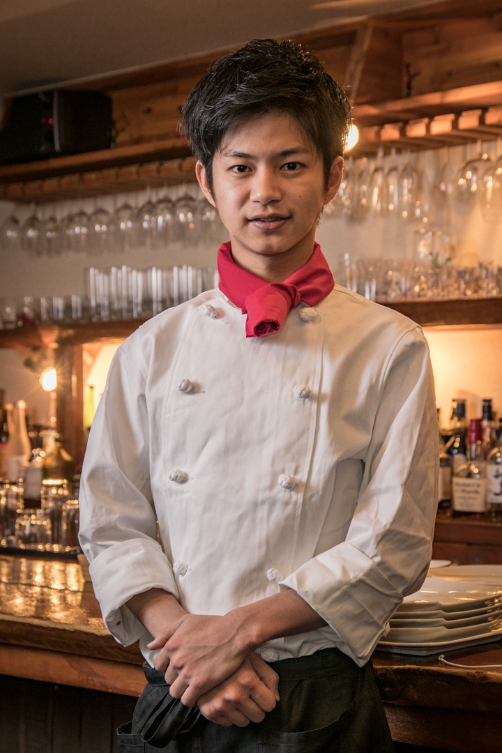 2018年1月23日、肉バルCOMPLETEにて撮影。